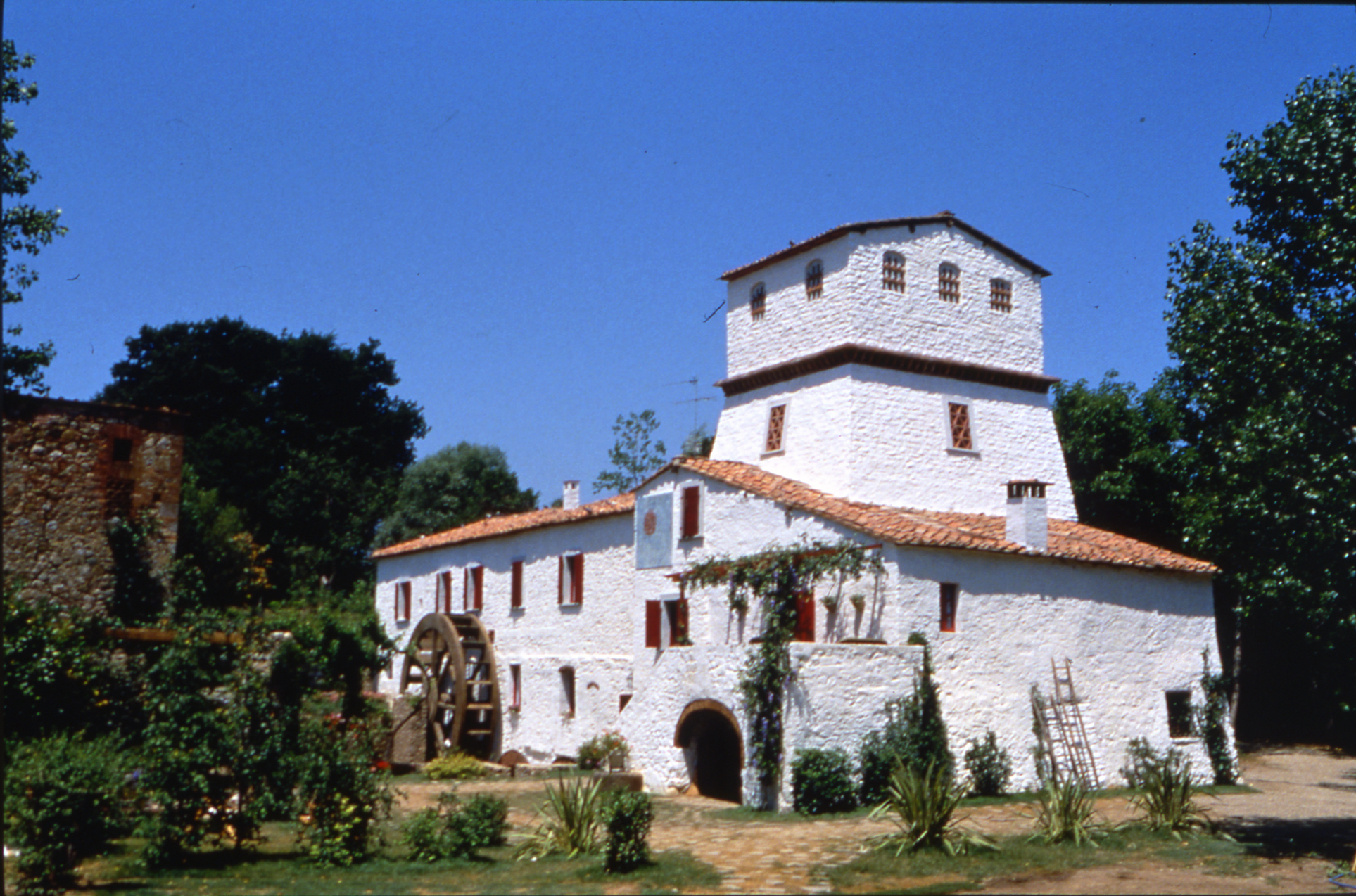 Veduta del Mulino di Chiusdino, in provincia di Siena, set degli spot della Famiglia del Mulino Bianco, 1990 (Archivio storico Barilla G. e R. Fratelli spa, Fondo Barilla)